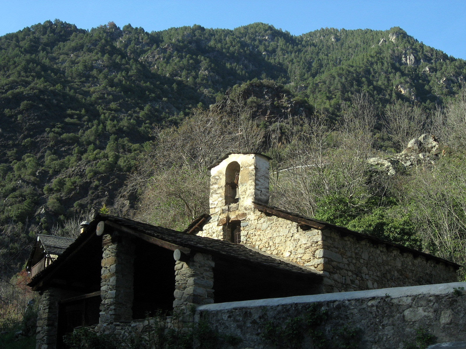 Church: Sant Esteve de Bixessarri